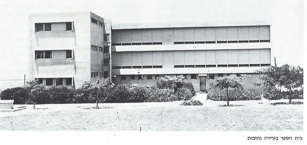 משפחת שקד בנתה בית ספר בנתיבות בשנות החמישים של המאה העשרים